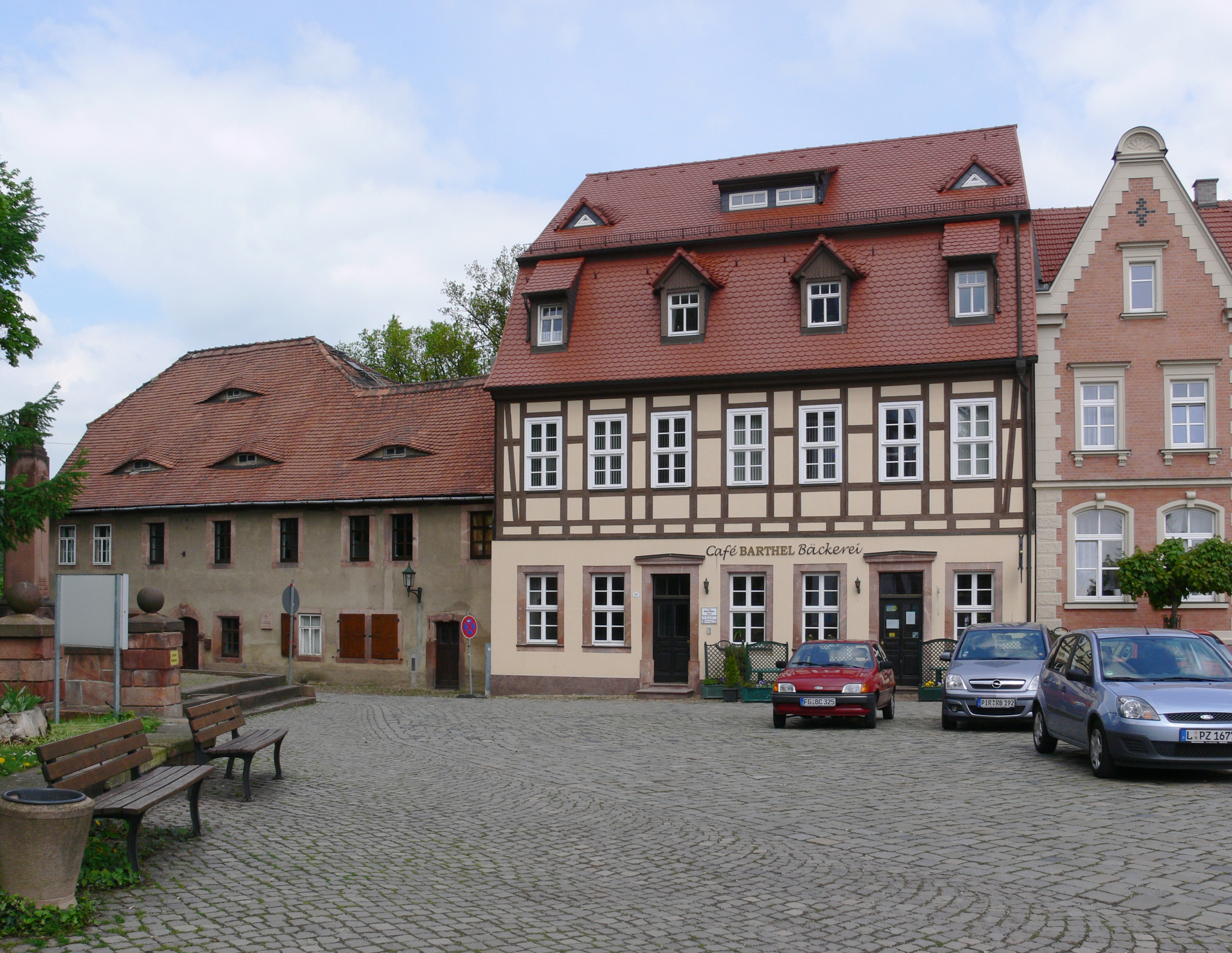 Wechselburg, Landkreis Mittelsachsen Bäckerei / Café am Markt, Markt 18 (links) + 19 (rechts)